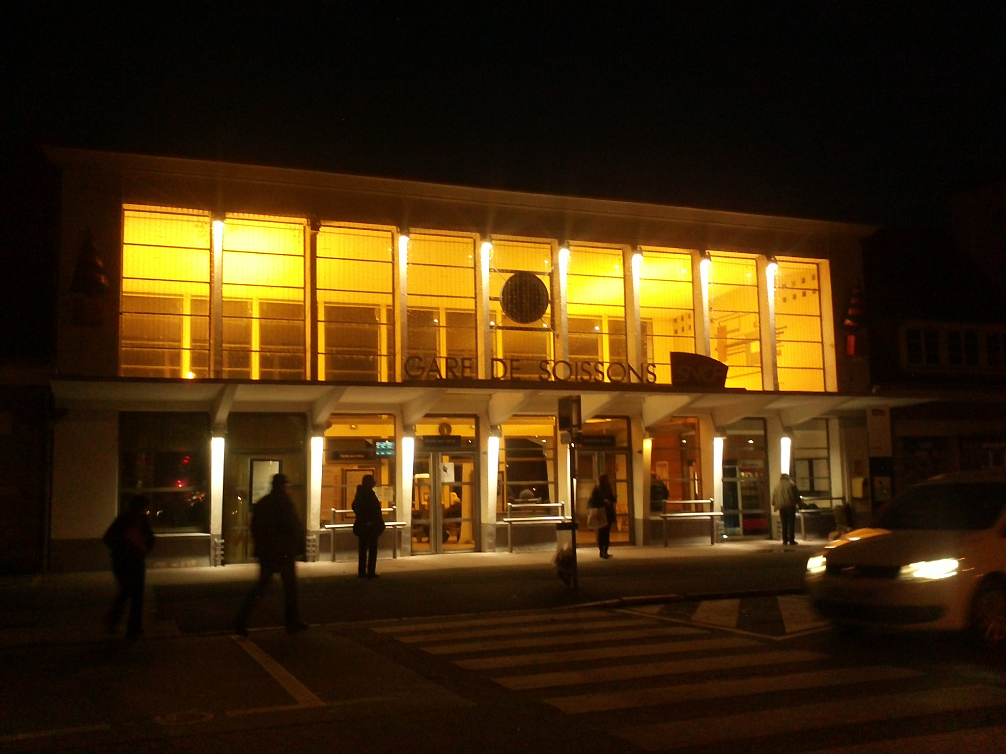 Gare de Soissons-2013